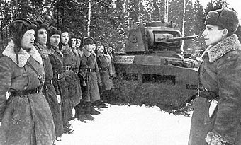 Tank Matilda Mk II v sovětských službách (1941-1943)